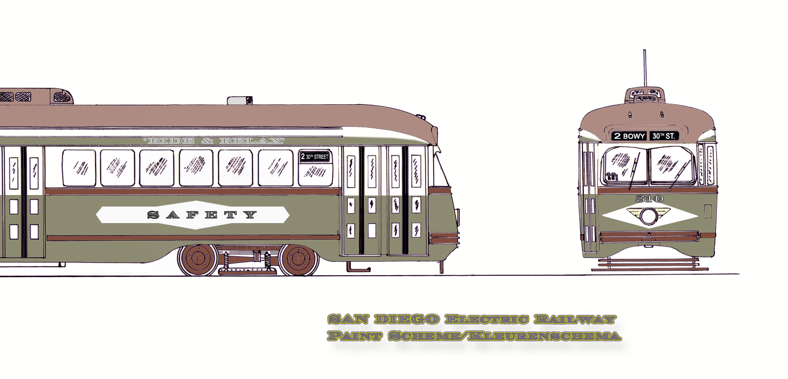 Zelfgetekend, daarna gescand en ingekleurd met Photoshop CS Categorie:Afbeelding tram